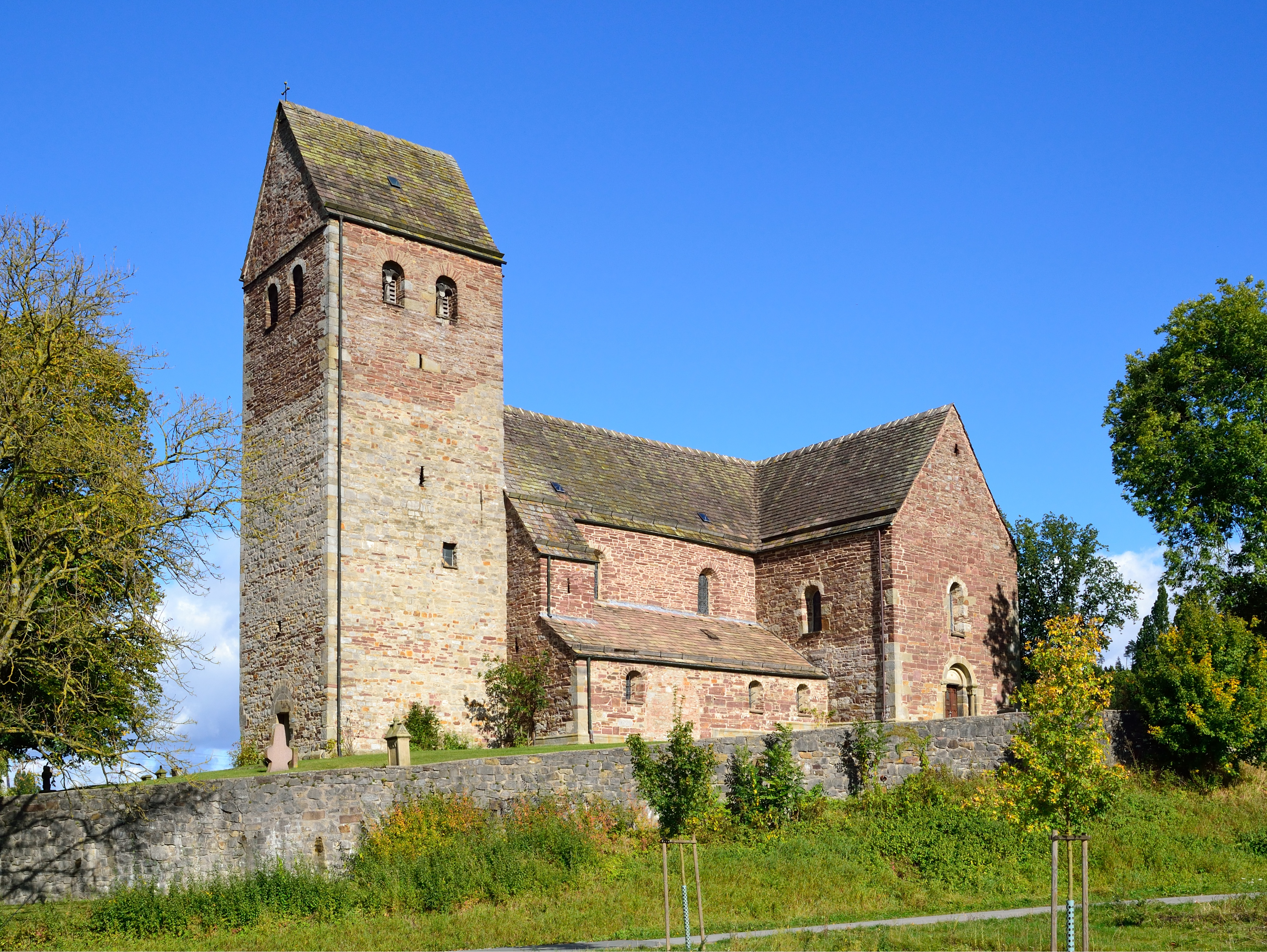 This is a photograph of an architectural monument. Kilianskirche (Lügde); Ansicht von Süden